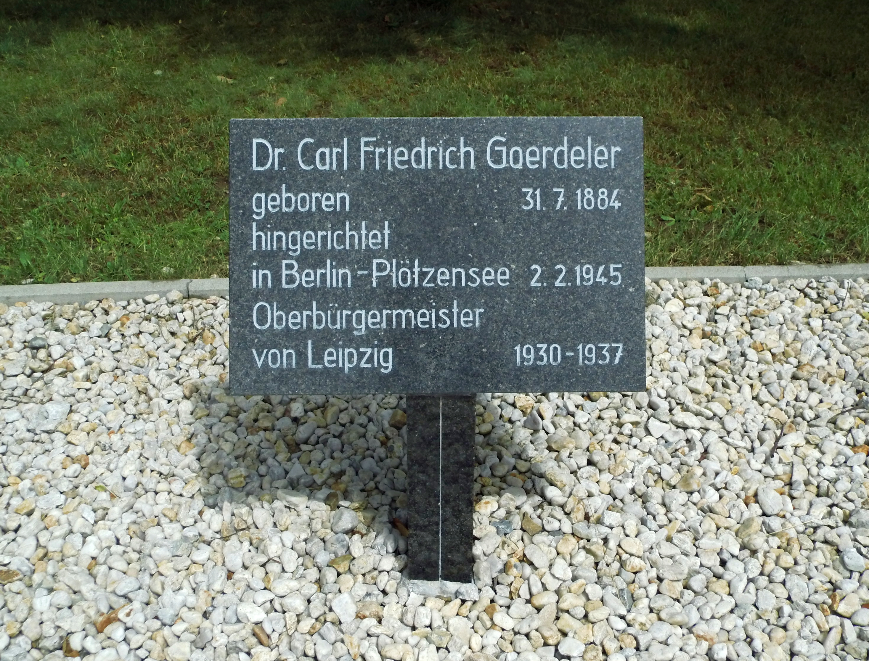 Gedenktafel Carl Friedrich Goerdeler